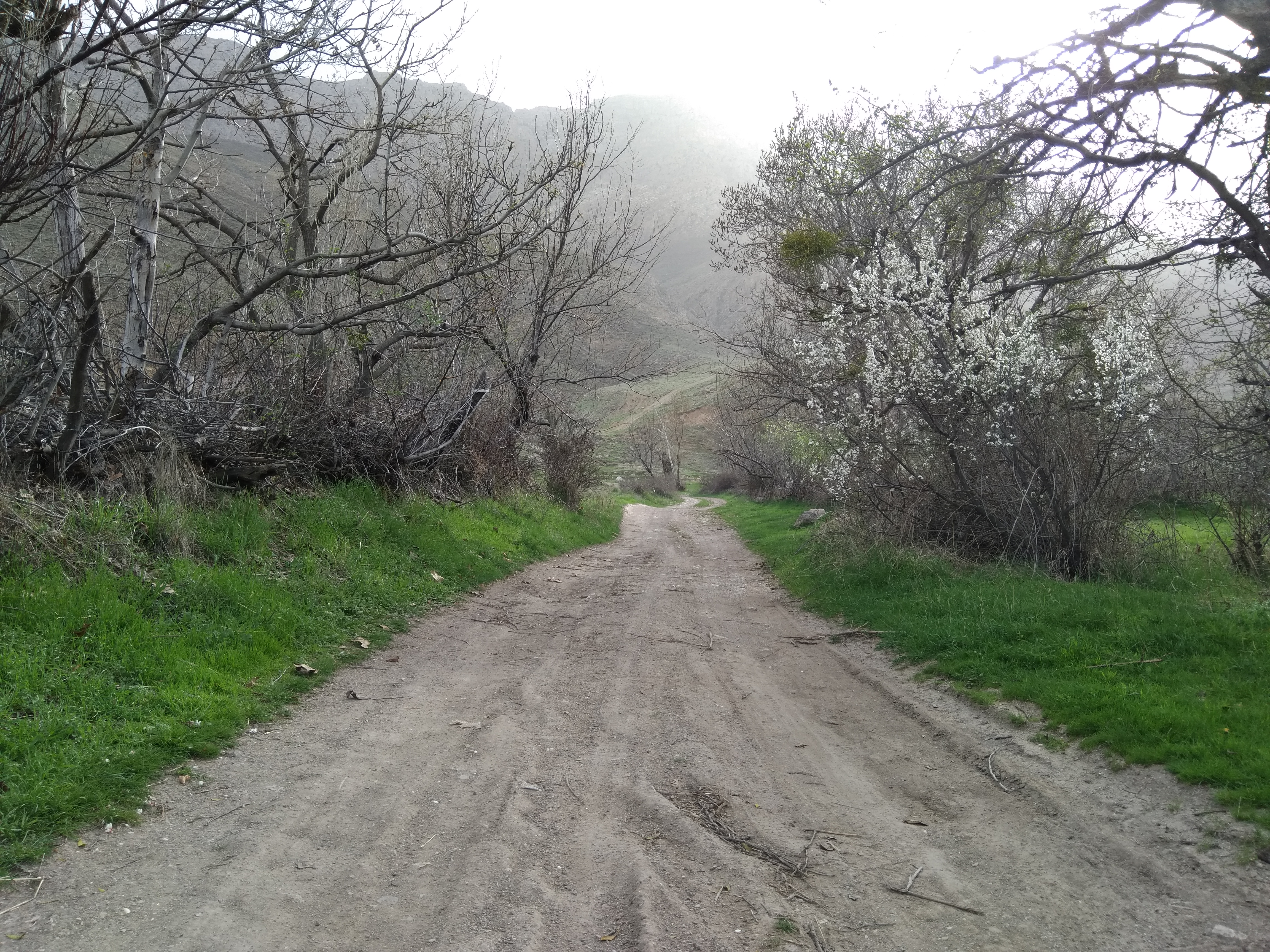 طبیعت زیبای خسرود